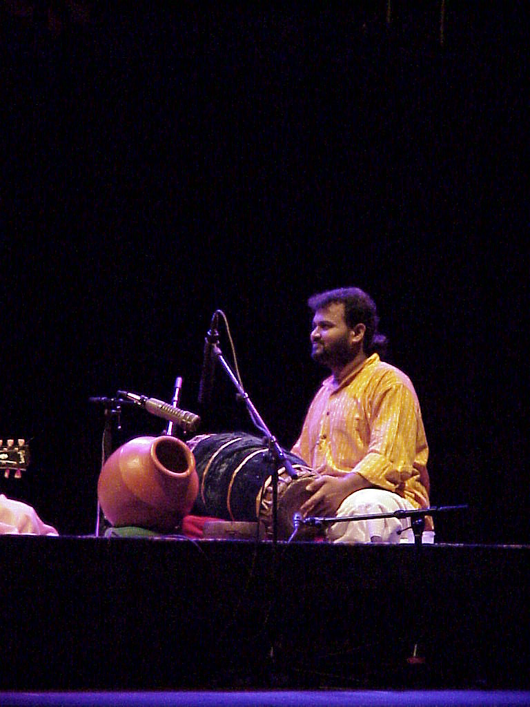 V.Selvaganesh in Munich, Remember Shakti Concert, Bayrischer Hof 2001